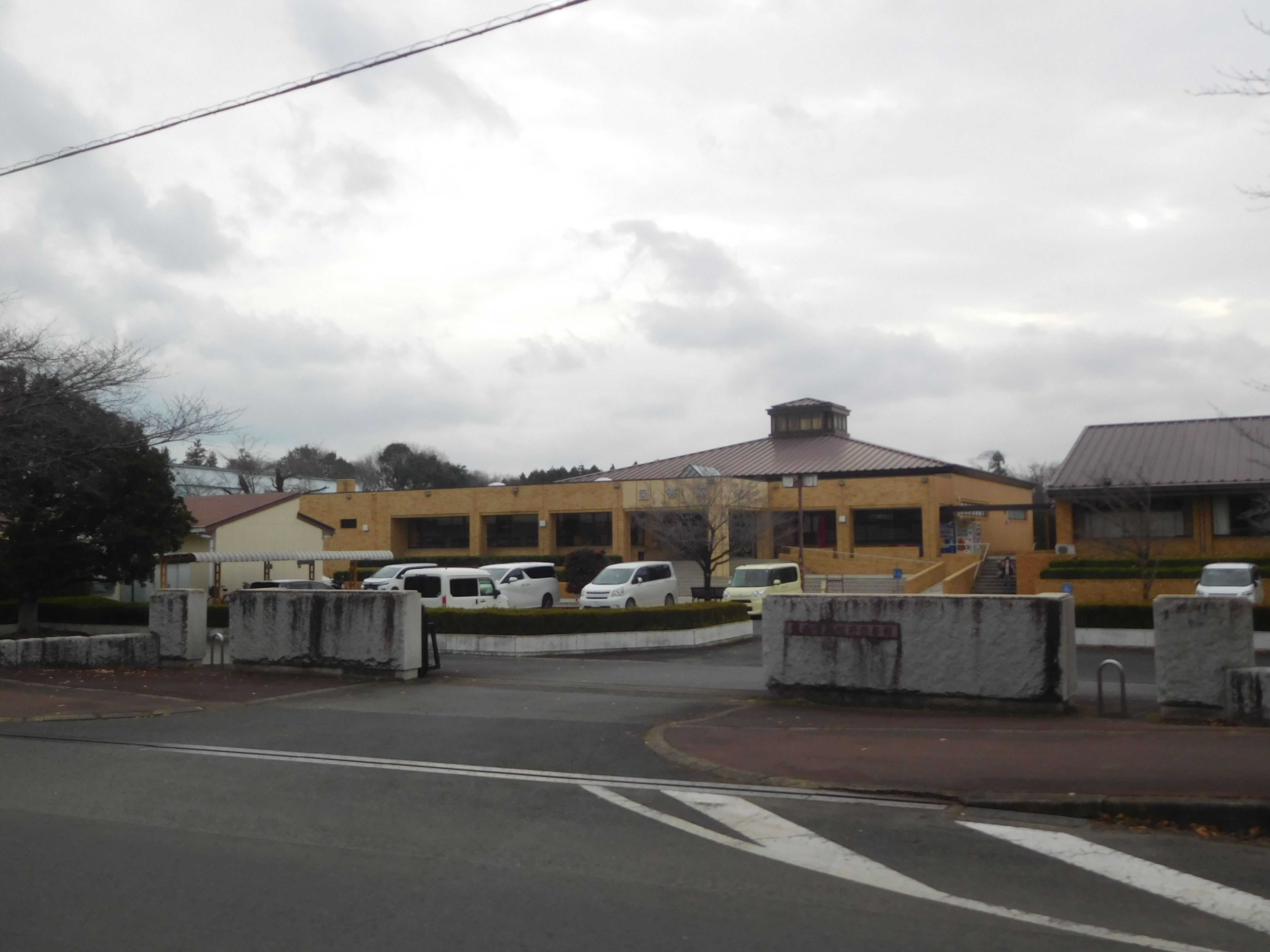 茨城県筑西市海老ヶ島にある、筑西市立明野図書館。